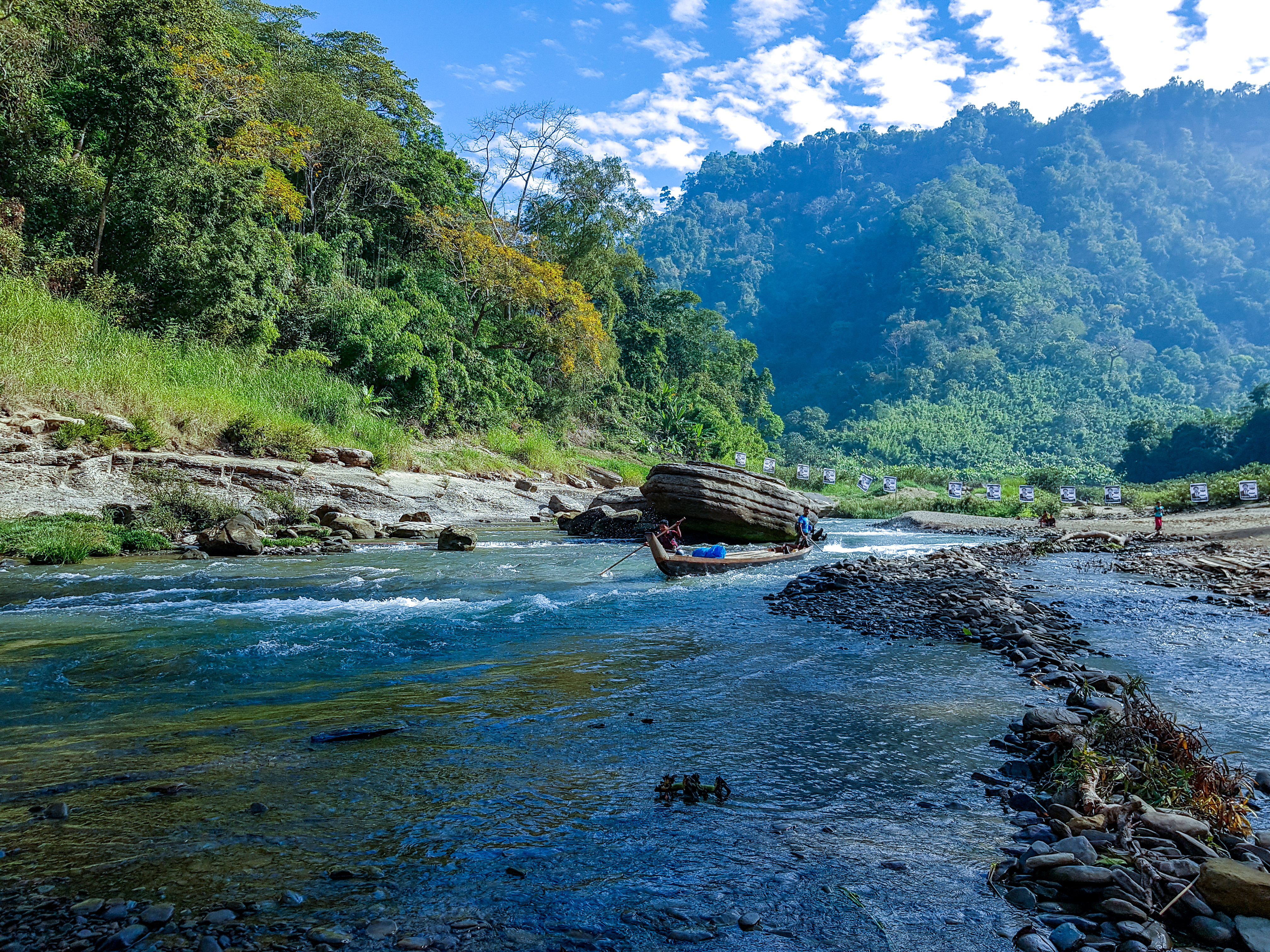 সাঙ্গু বন্যপ্রাণ অভয়ারণ্য